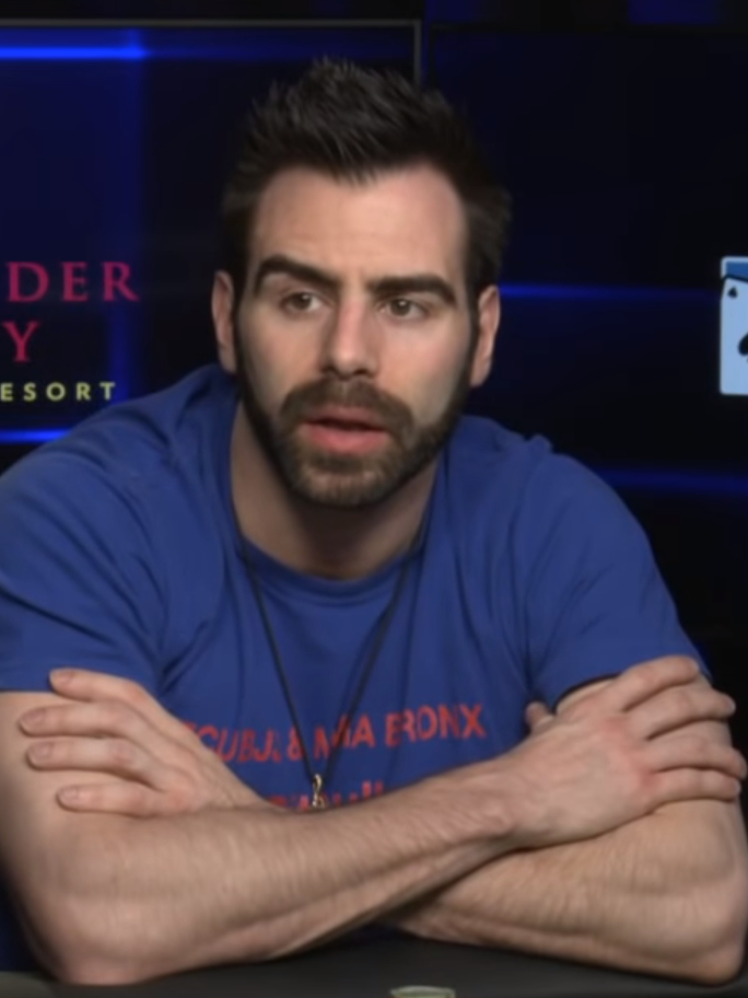 Olivier Busquet am Finaltisch des WPT Rolling Thunder